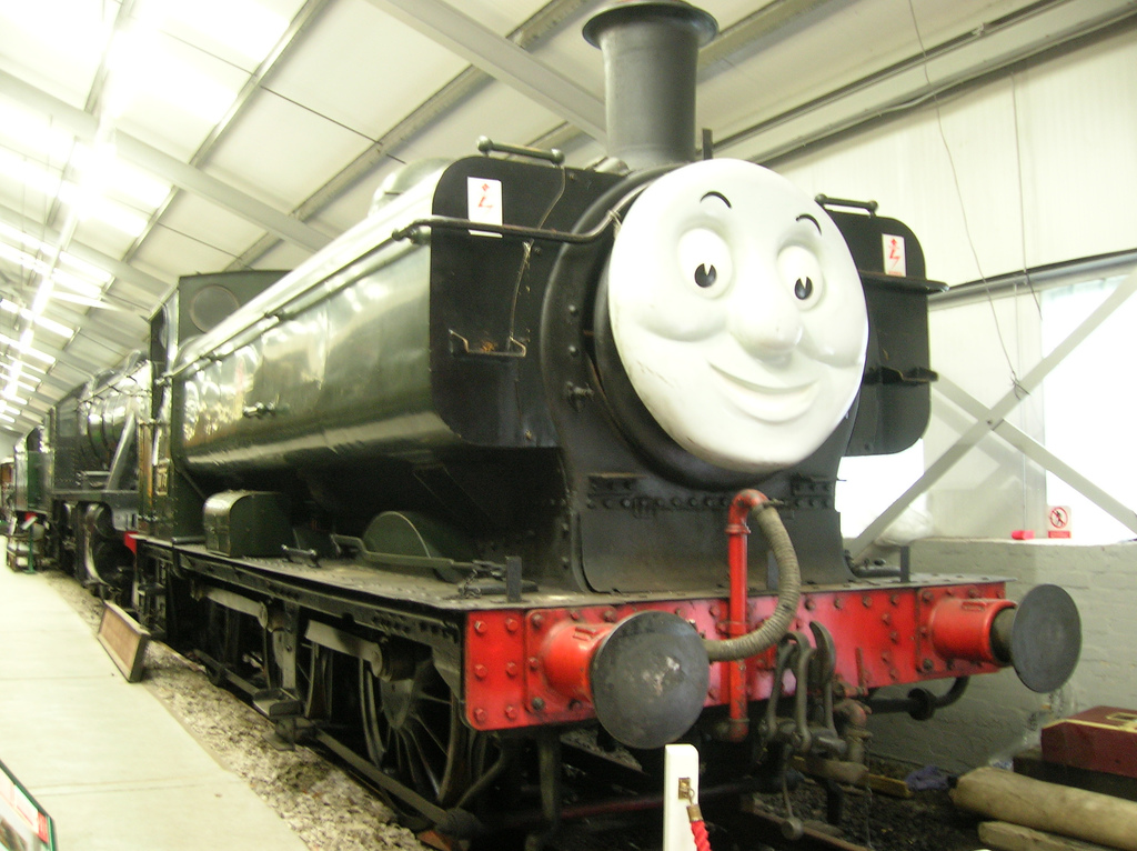 DUCK, Museum Oxenhope